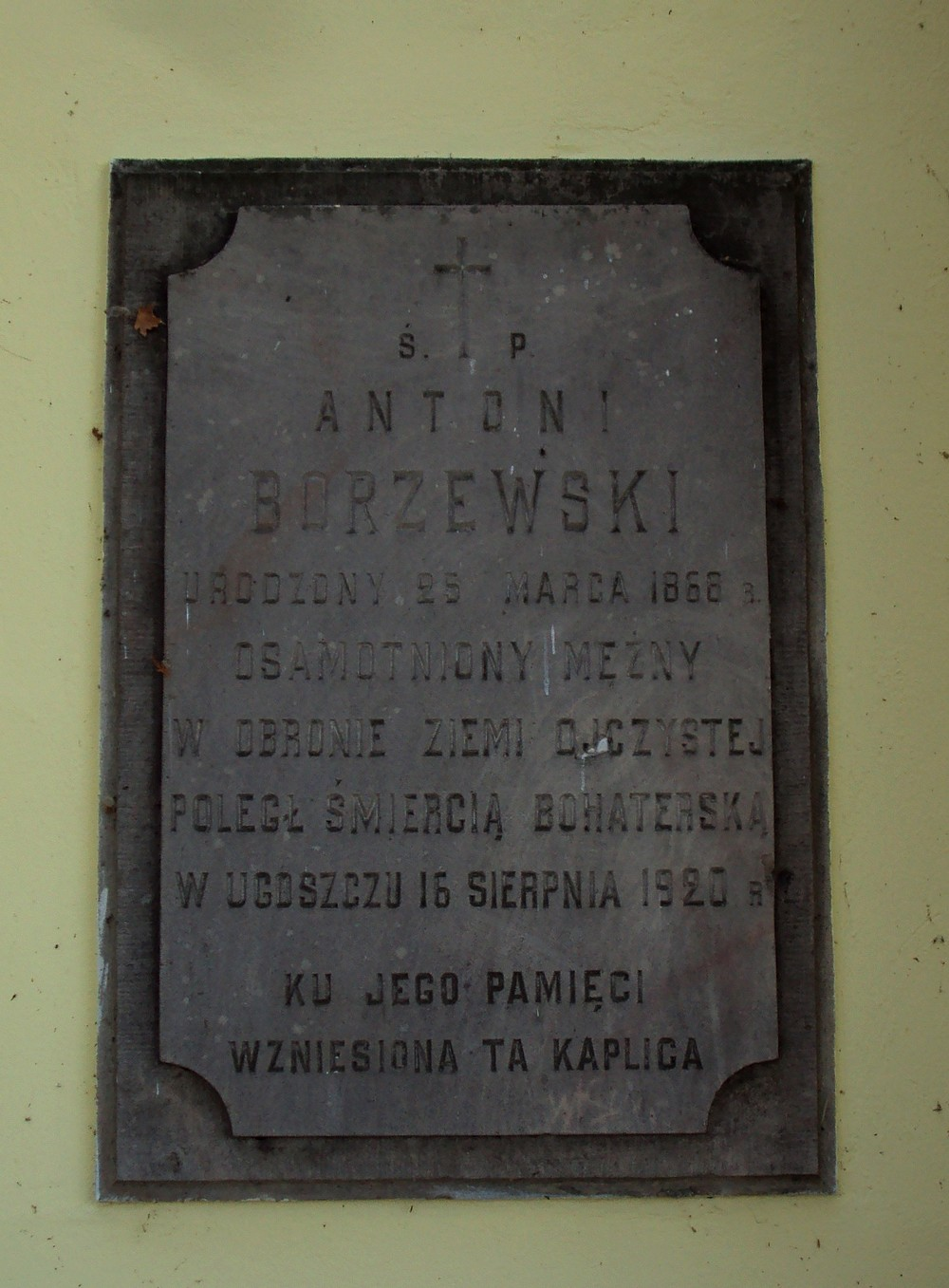 Kaplica Najświętszego Serca Jezusowego w Ostrowitem (powiat rypiński), tablica upamiętniająca Antoniego Borzewskiego.